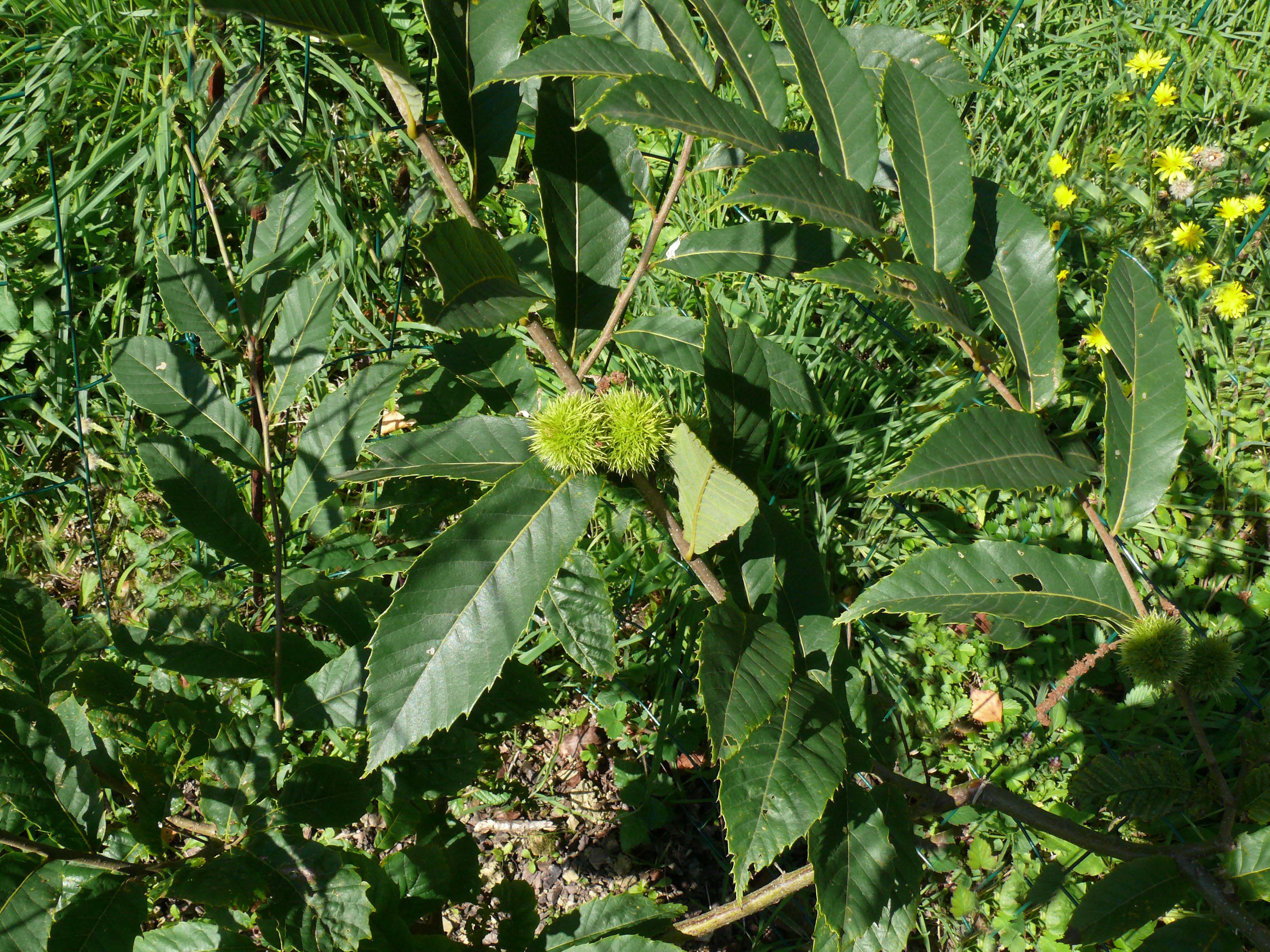 Castanea seguinii. Foto tomada en el Jardín Botánico de Iturraran.